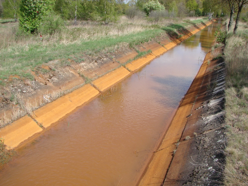 Deutlich sichtbar die "Verockerung" der Tranitz in der Nähe des Ortes Bärenbrück. Die Eisensulfide im Boden (Abraum) verwittern, es entsteht Eisenhydroxid und Sulfat. Damit ist das Wasser für die Entwicklung von Leben ungeeignet.